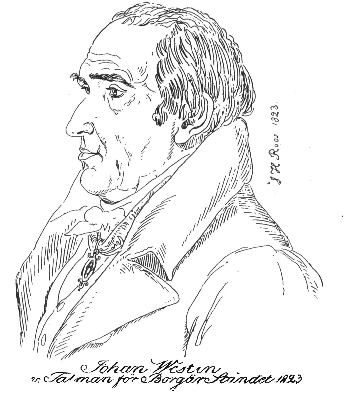 Johan Westin (1751-1828)